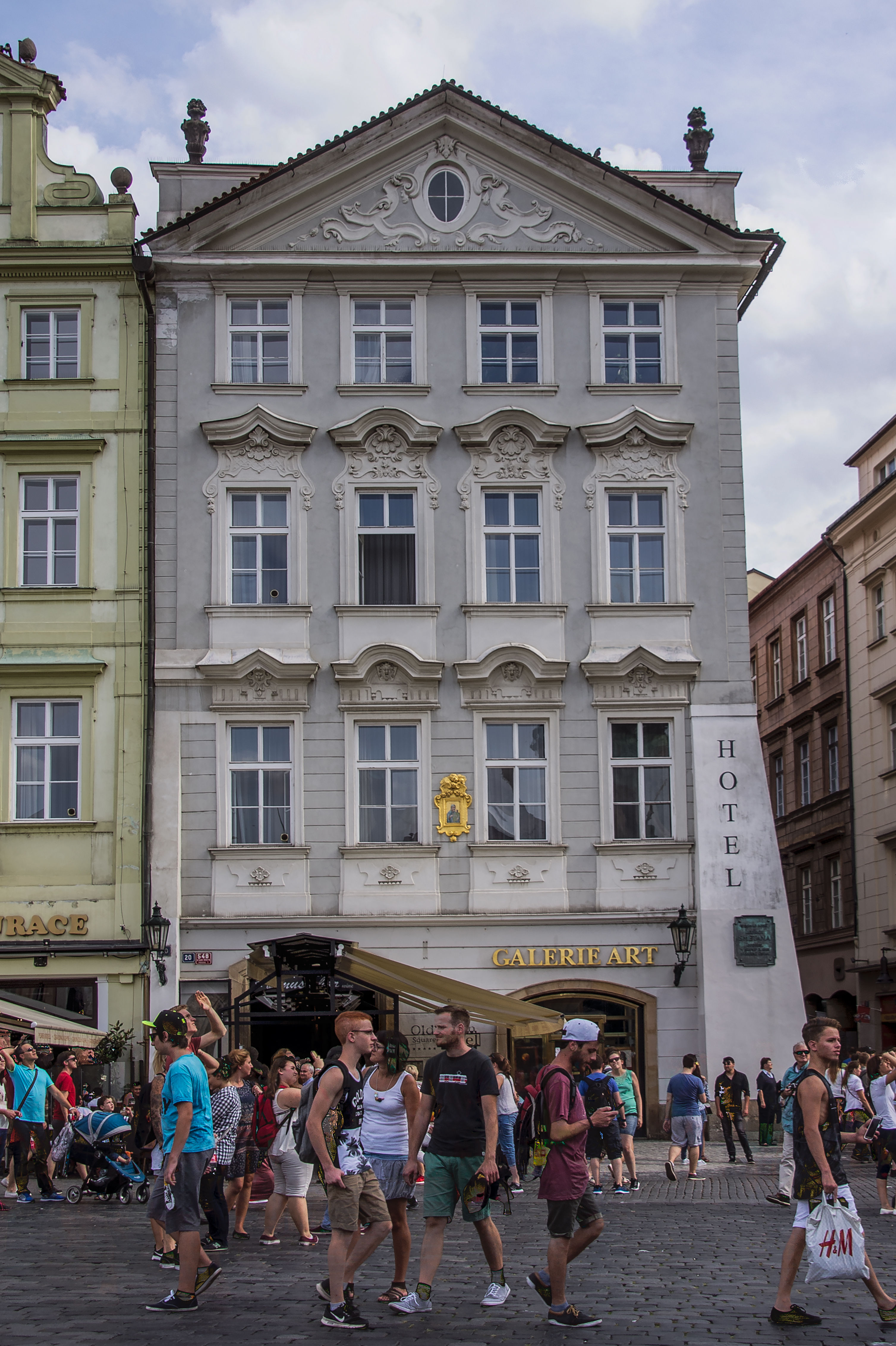 Smetanova hudební škola na Staroměstském náměstí